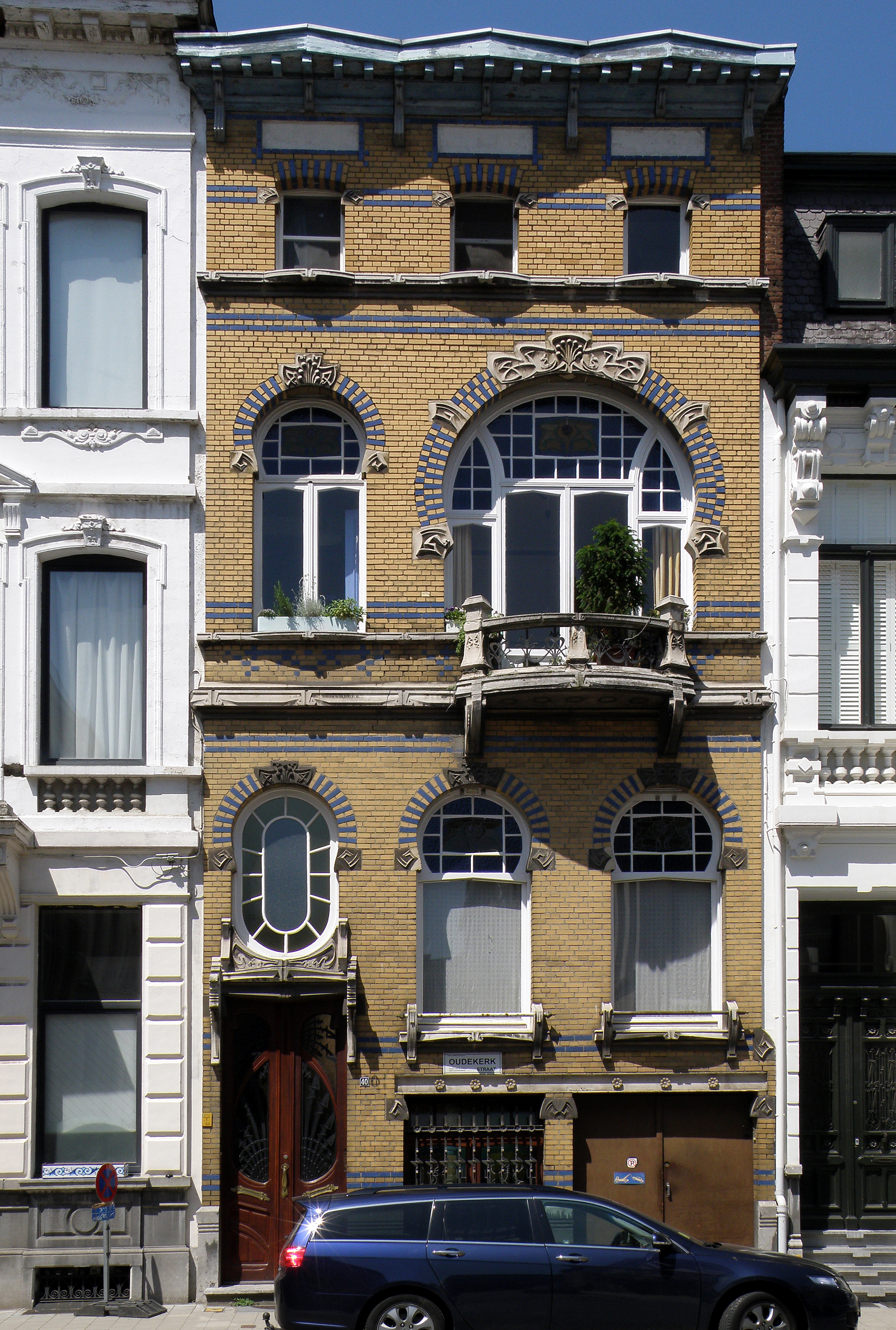 Antwerpen, distr. Antwerpen. Huis in Art nouveau-stijl, Oudekerkstraat nr. 40. Ontwerp van Frans Smet-Verhas uit 1904. Vgl. verder Inventaris Bouwkundig Erfgoed.